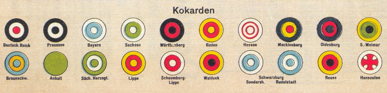 Kokarden der deutschen Heere bis 1918